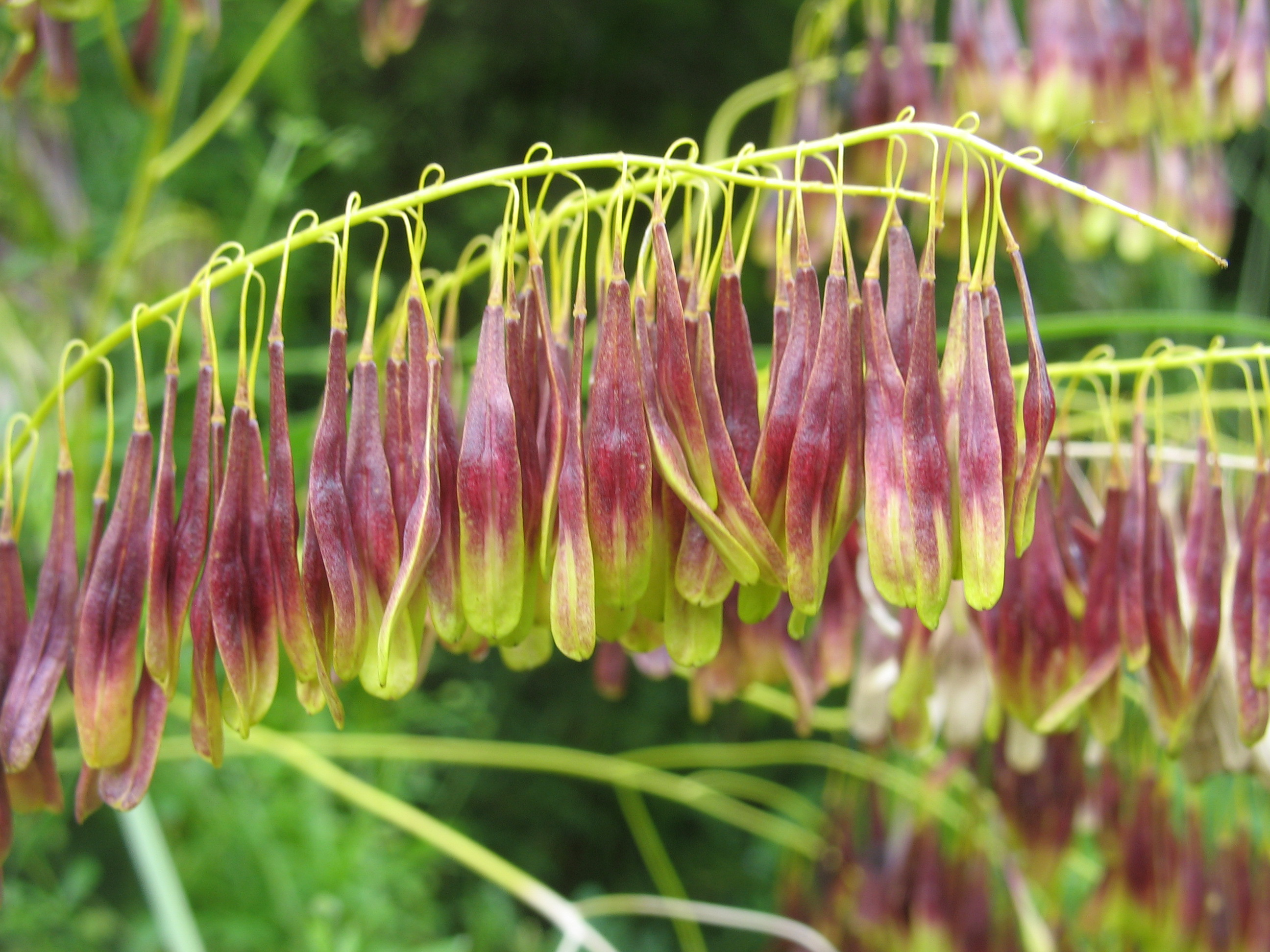 Halbreife Früchte des Färberwaid (Isatis tinctoria), Dürnstein